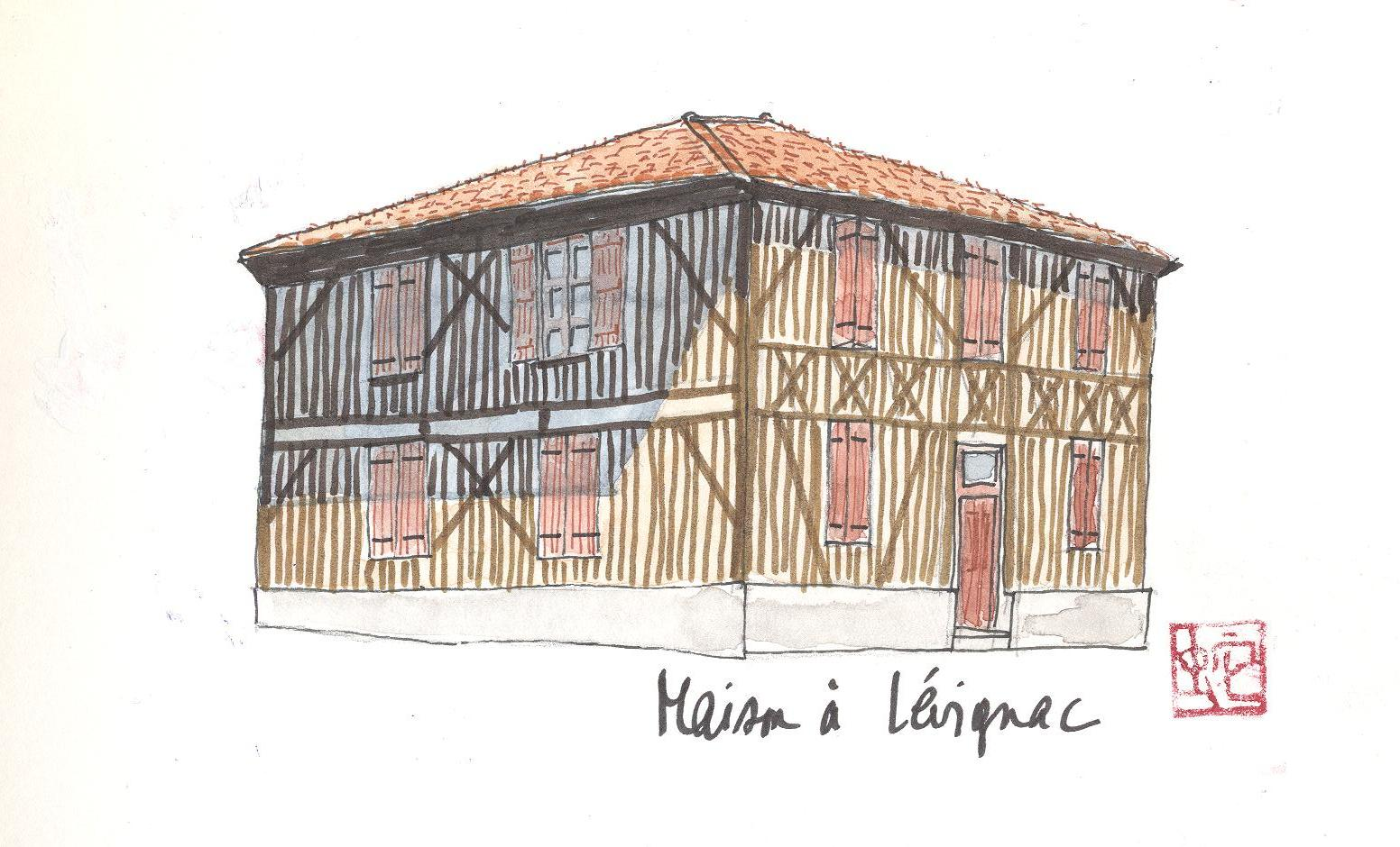 Aquarelle d'une maison landaise typique à Lévignacq dans le département français des Landes.